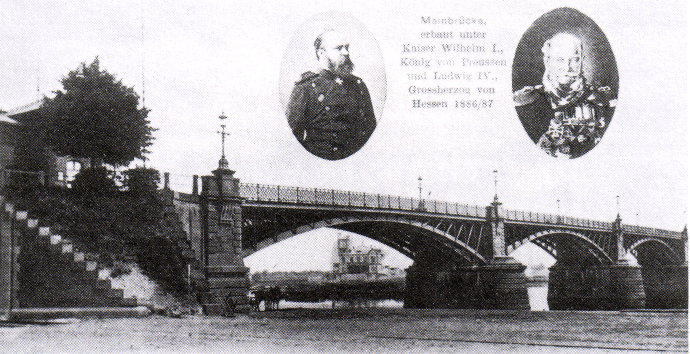 Description: Postkarte zur Einweihung der Offenbacher Mainbrücke aus dem Jahr 1887 Source: Wolfram Gorr: Frankfurter Brücken, Frankfurt am Main 1982, S. 30 Author: unbekannt Date: 1887